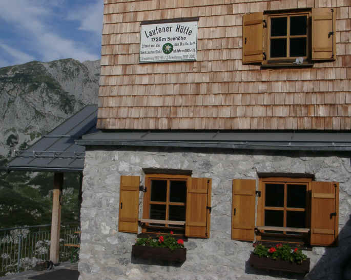 Laufener Hütte im DAV, Hüttenschild.